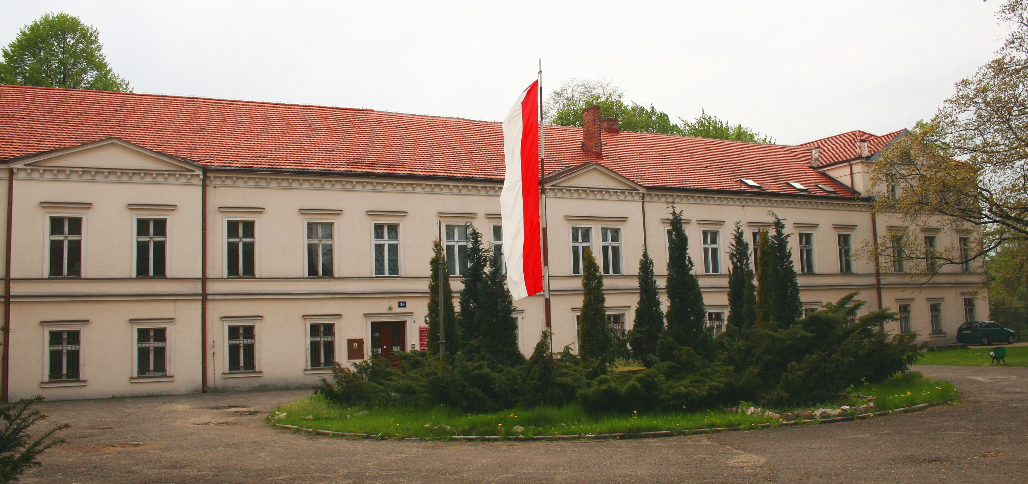 Edukacyjne Centrum Ubioru i Rzemiosła Tarnowskie Góry, Polska, województwo śląskie